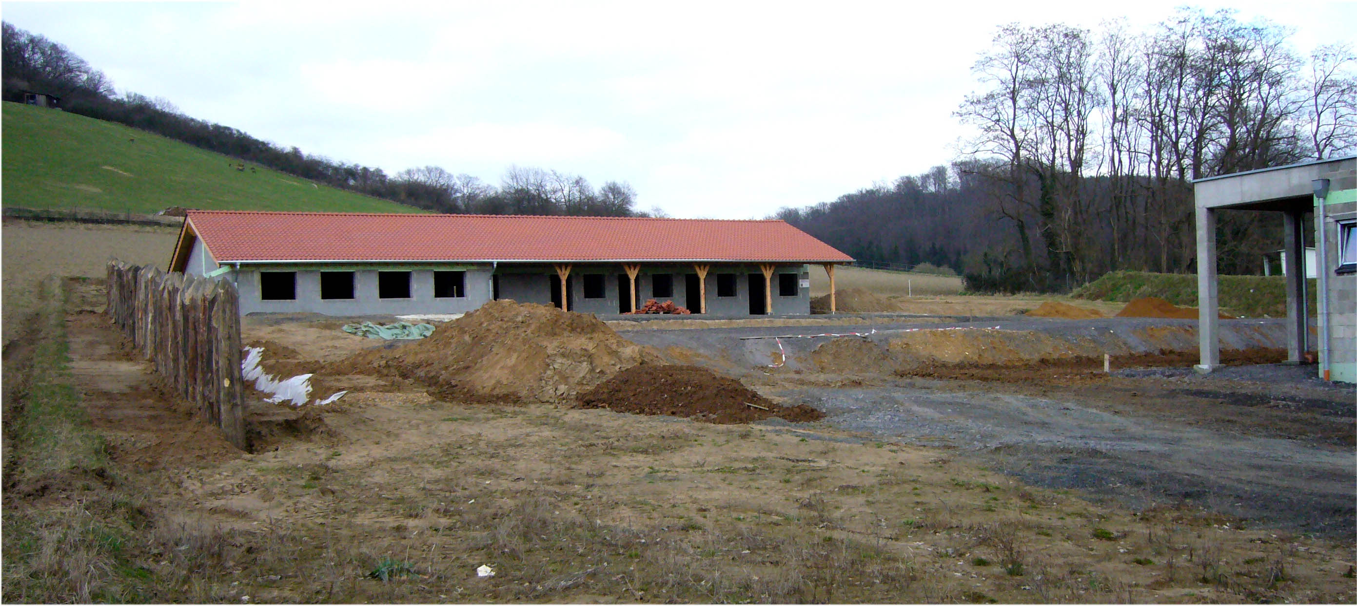 Römerzentrum